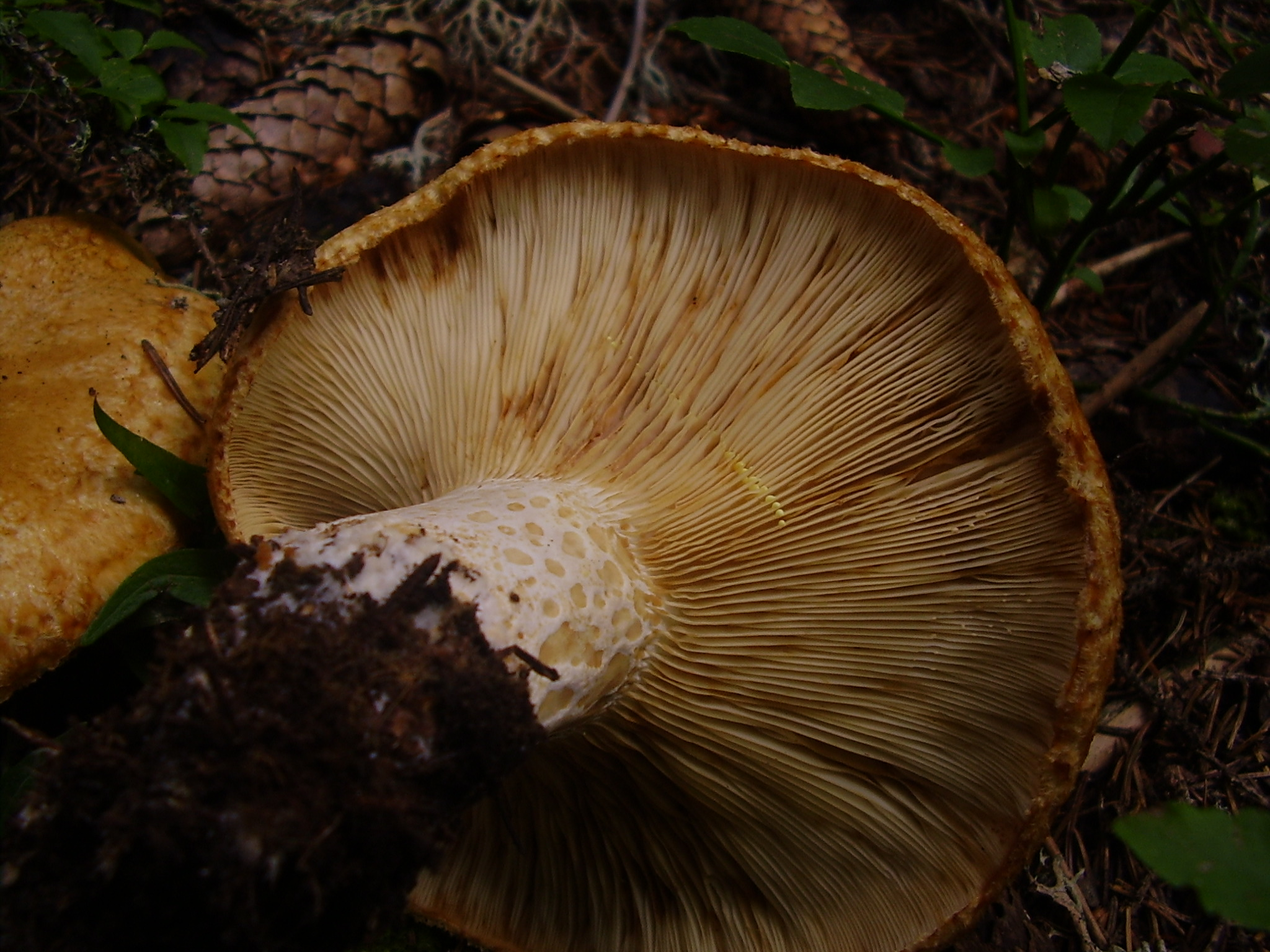 Lactarius scrobiculatus from coniferous forest in Bulgaria.